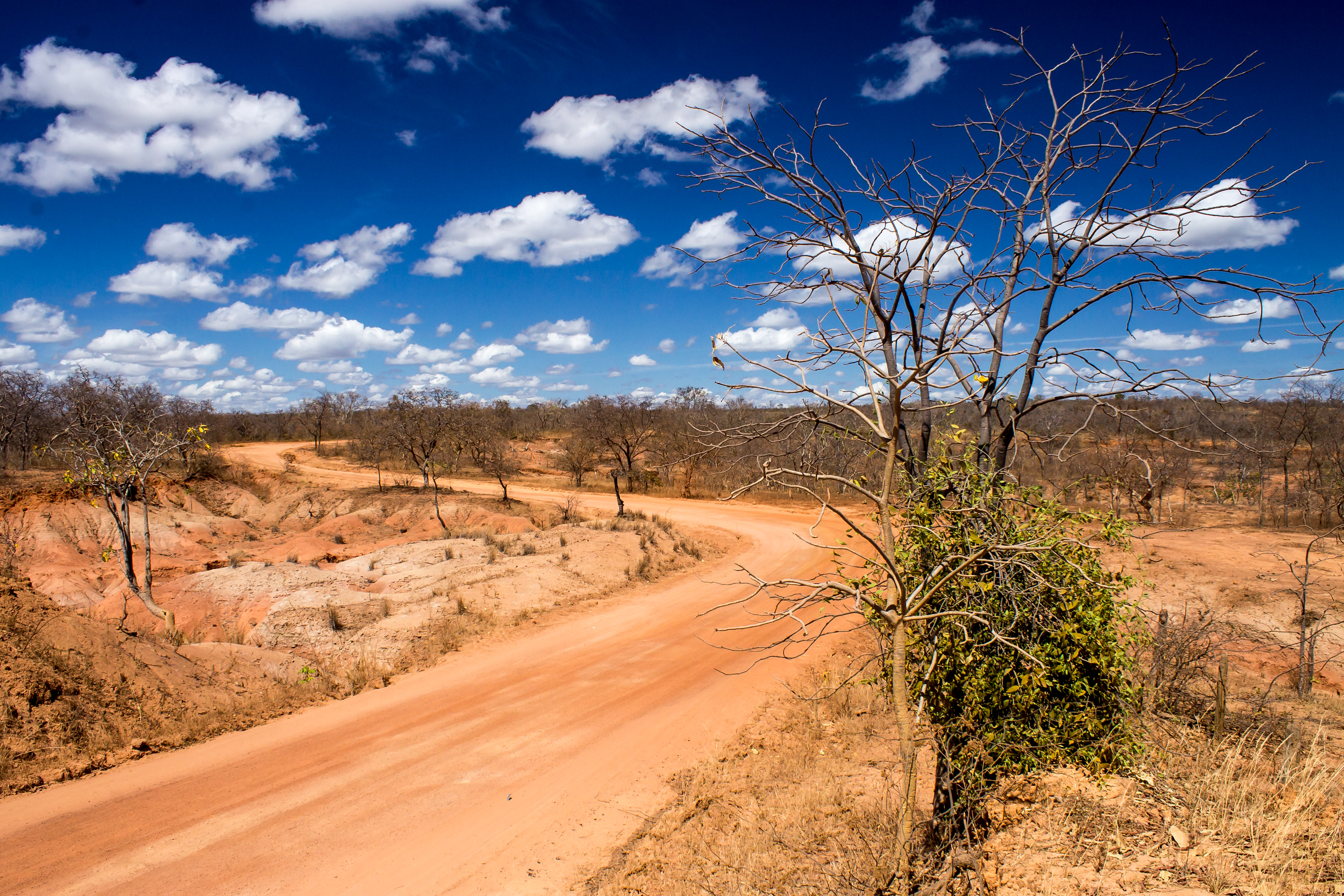 Estrada serpenteando o sertão de Minas Gerais próximo ao parque Grande Sertão Veredas